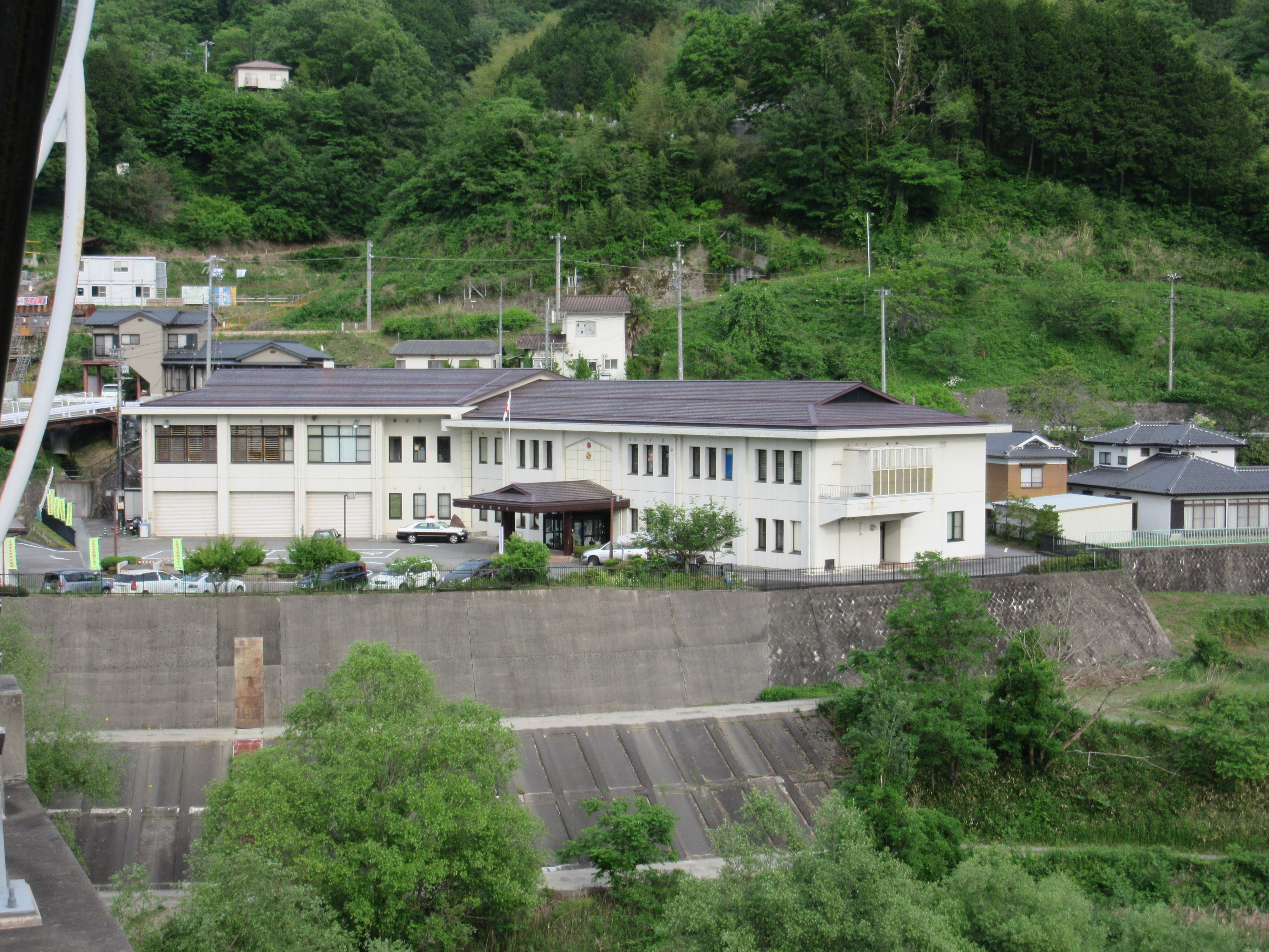 長野県阿南警察署